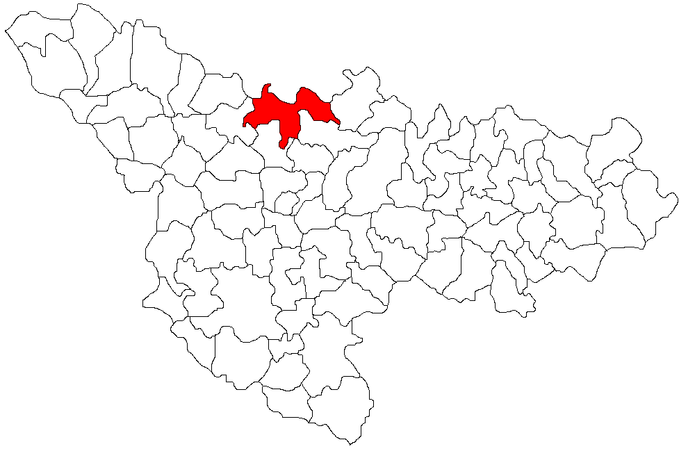 Categorie:Hărţi ale judeţului Timiş